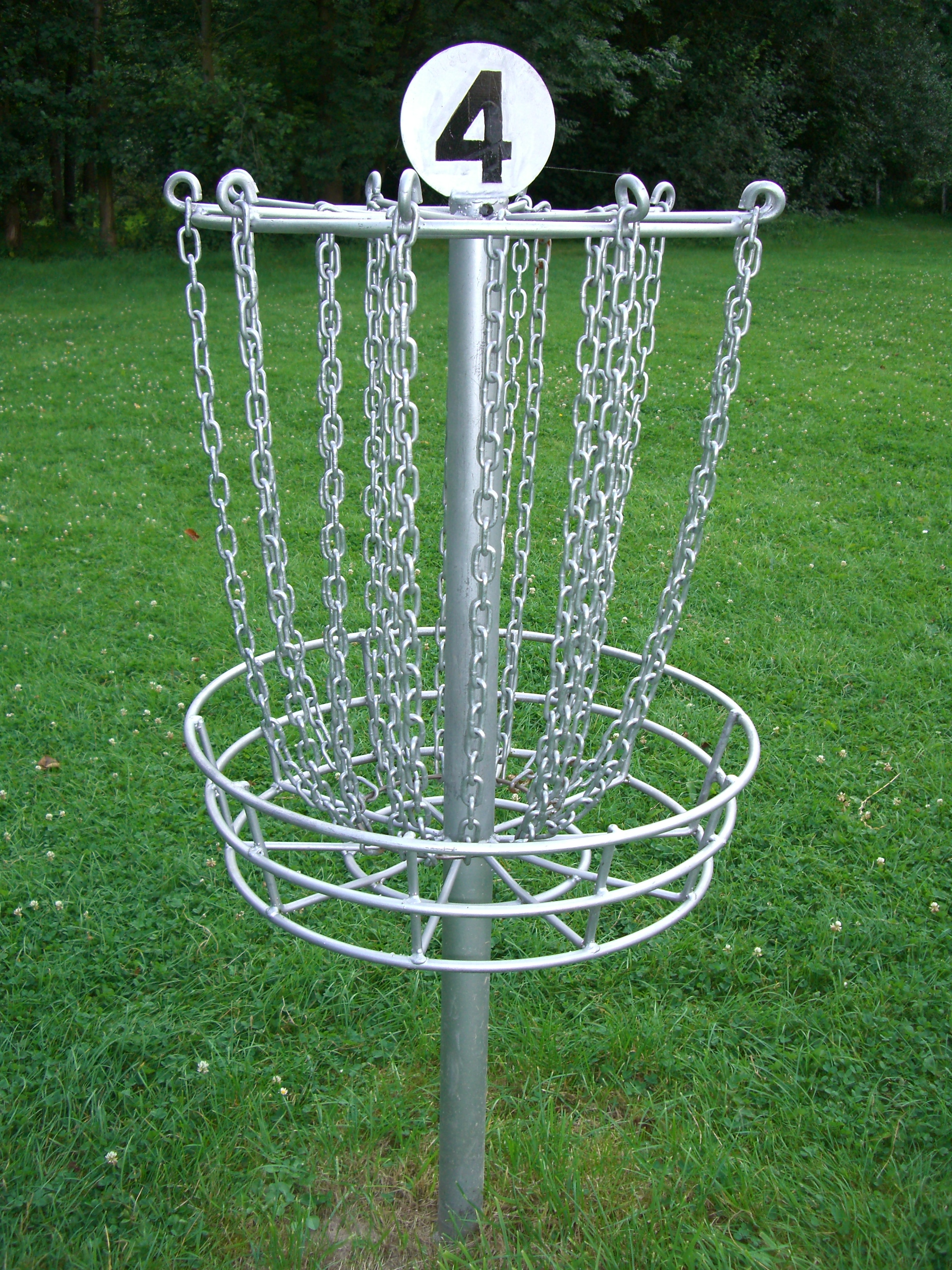 Discgolfkorg. Bilden tagen i Bryssel av Christian Gidlöf 7 augusti 2007 kl.18.42 (CEST).